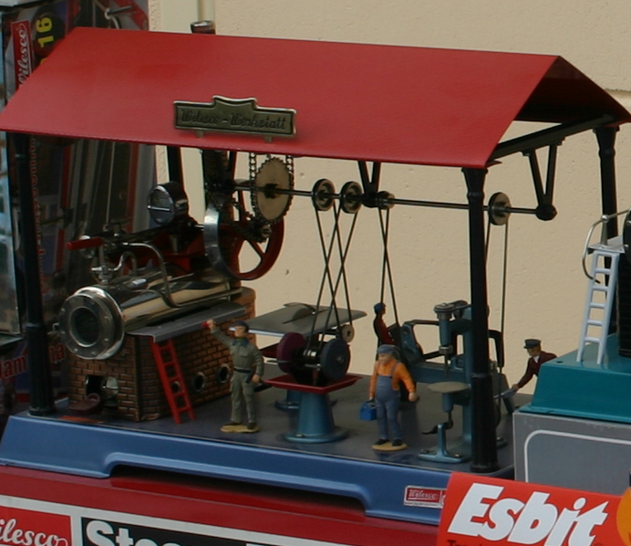 Pienoishöyrykoneen ympärille kasattu pienoistyöpaja